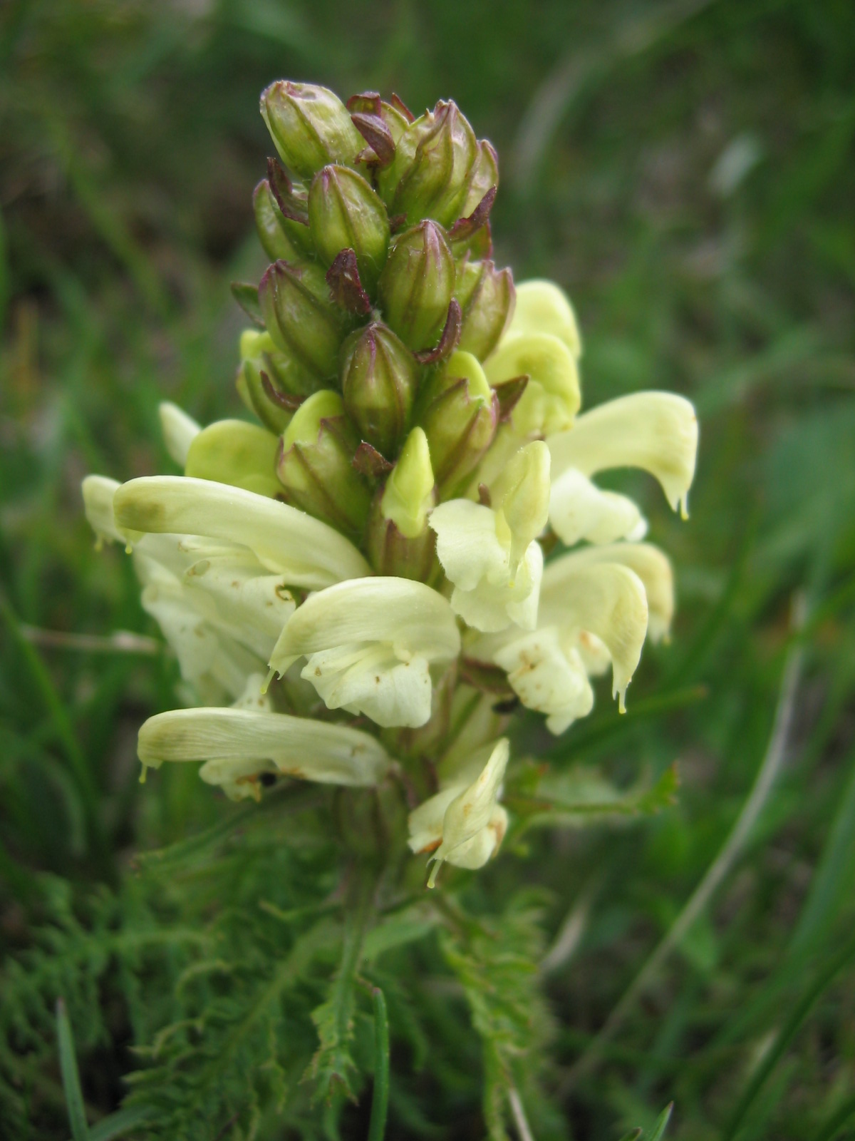 Pedicularis comosa : Bonnet de Calvin au dessus de Mens - (Trièves, France)